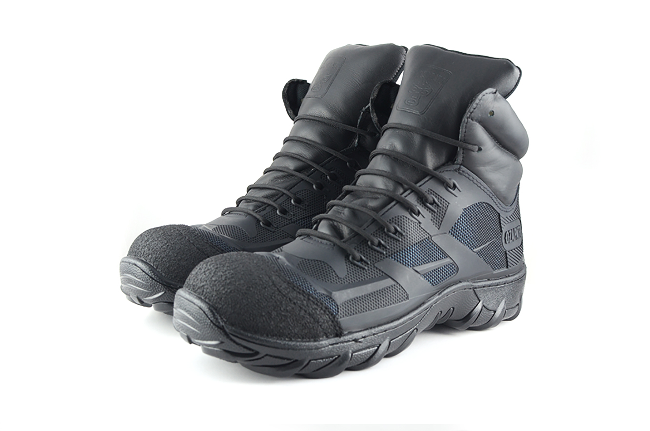 Botas dieléctricas tipo III en México